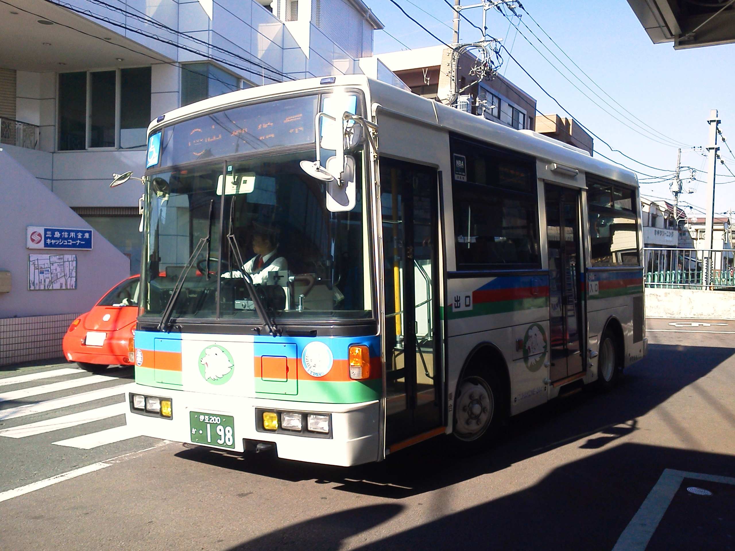 伊豆箱根バス 2441（三島営業所） 車種：日産ディーゼル スペースランナーRN（KC-RN210CSN） ※西武バス譲受車 ナンバー：伊豆200か198 撮影場所：伊豆箱根鉄道 駿豆線 大場駅